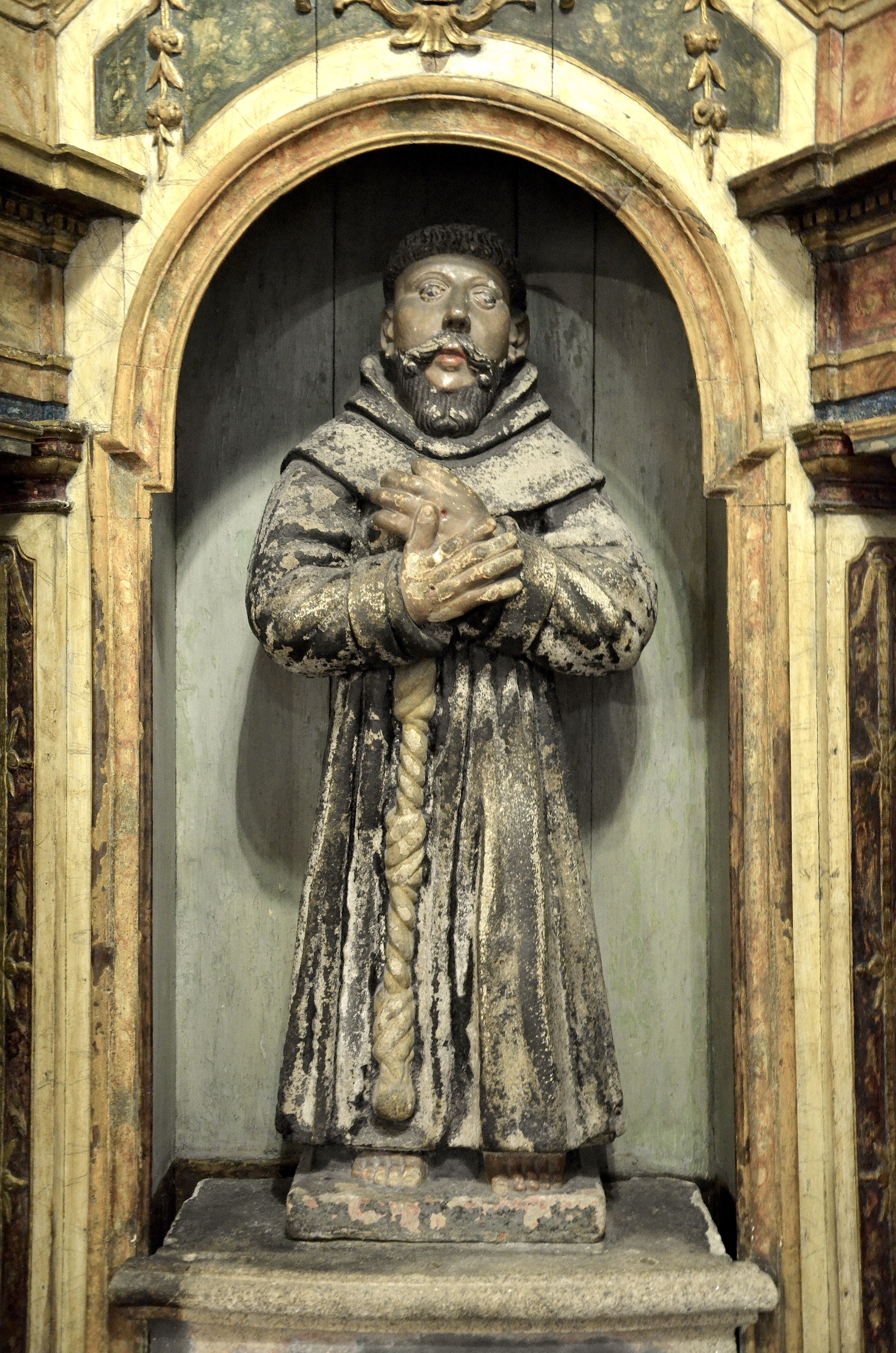 Chiesa di San Francesco Tags: portugal porto oporto portogallo